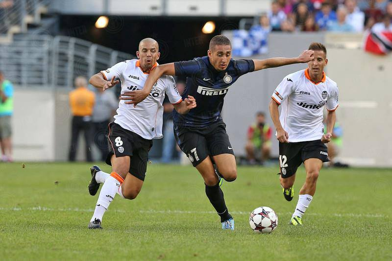 Sofiane Feghouli i Ishak Belfodil durant l'encontre València-Inter Milan de la Guiness Cup. Al fons, Joạo Pereira.